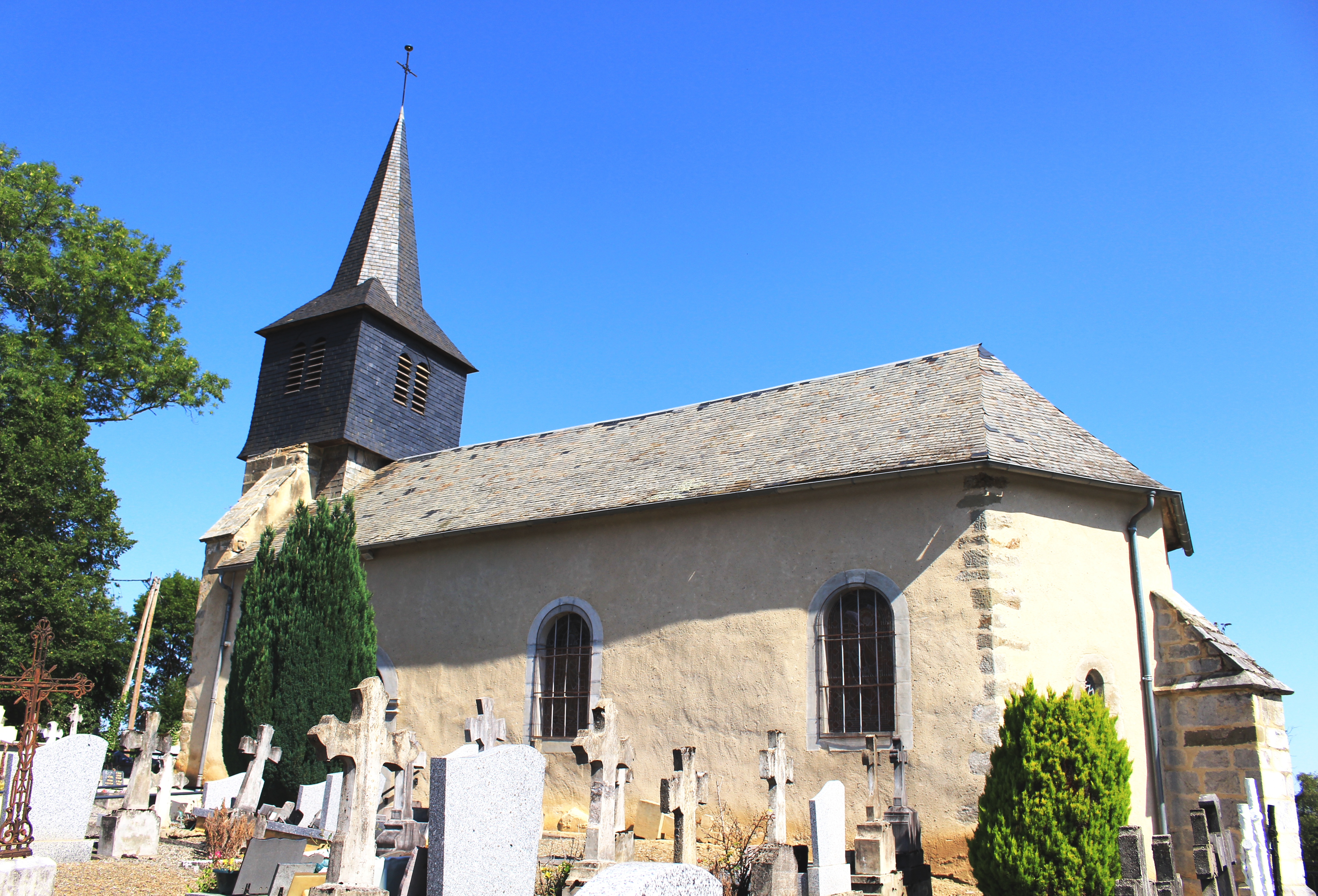 Église Saint-Pierre-aux-Liens d'Escots (Hautes-Pyrénées)